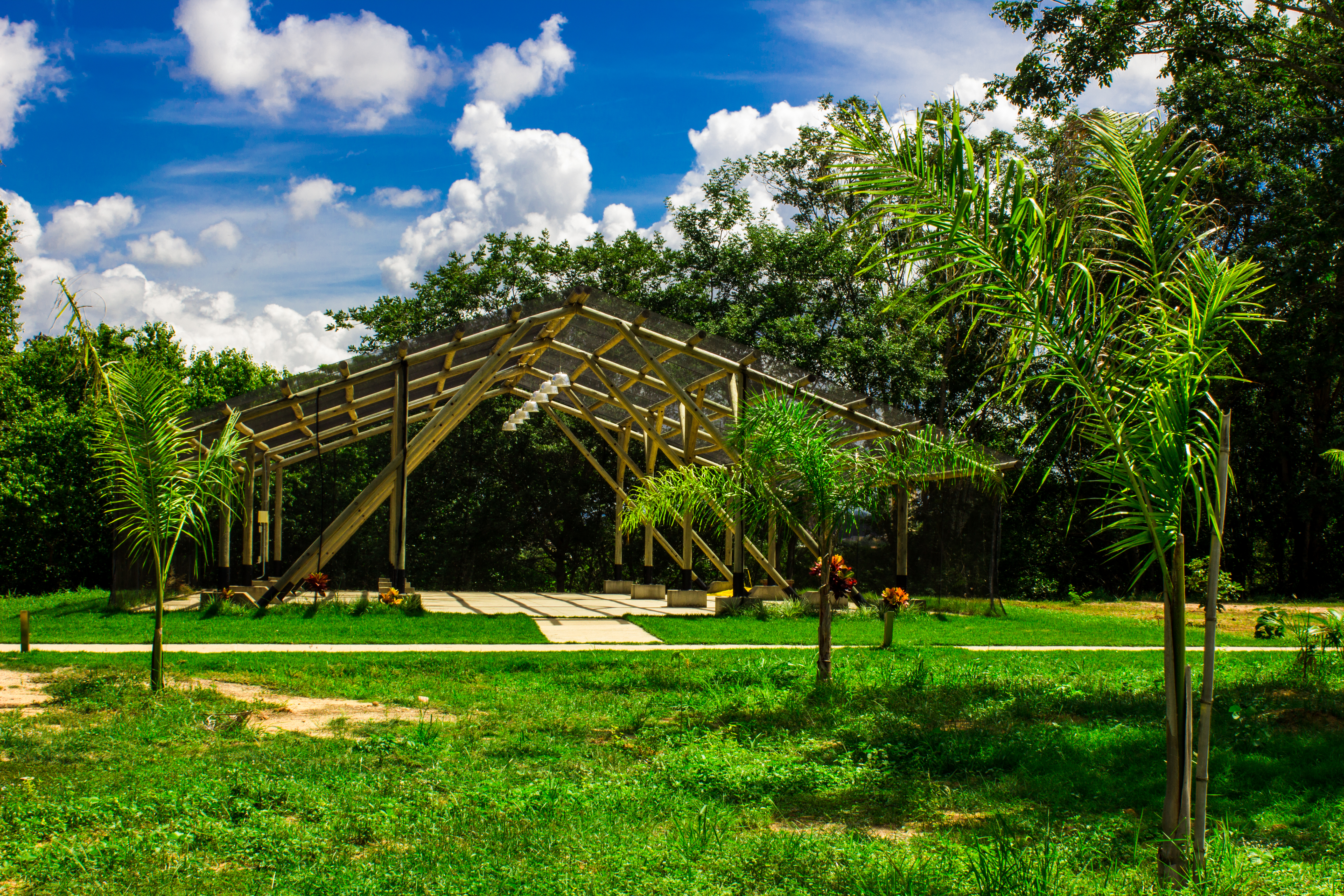 Imagem de estufa situada no Parque Municipal.